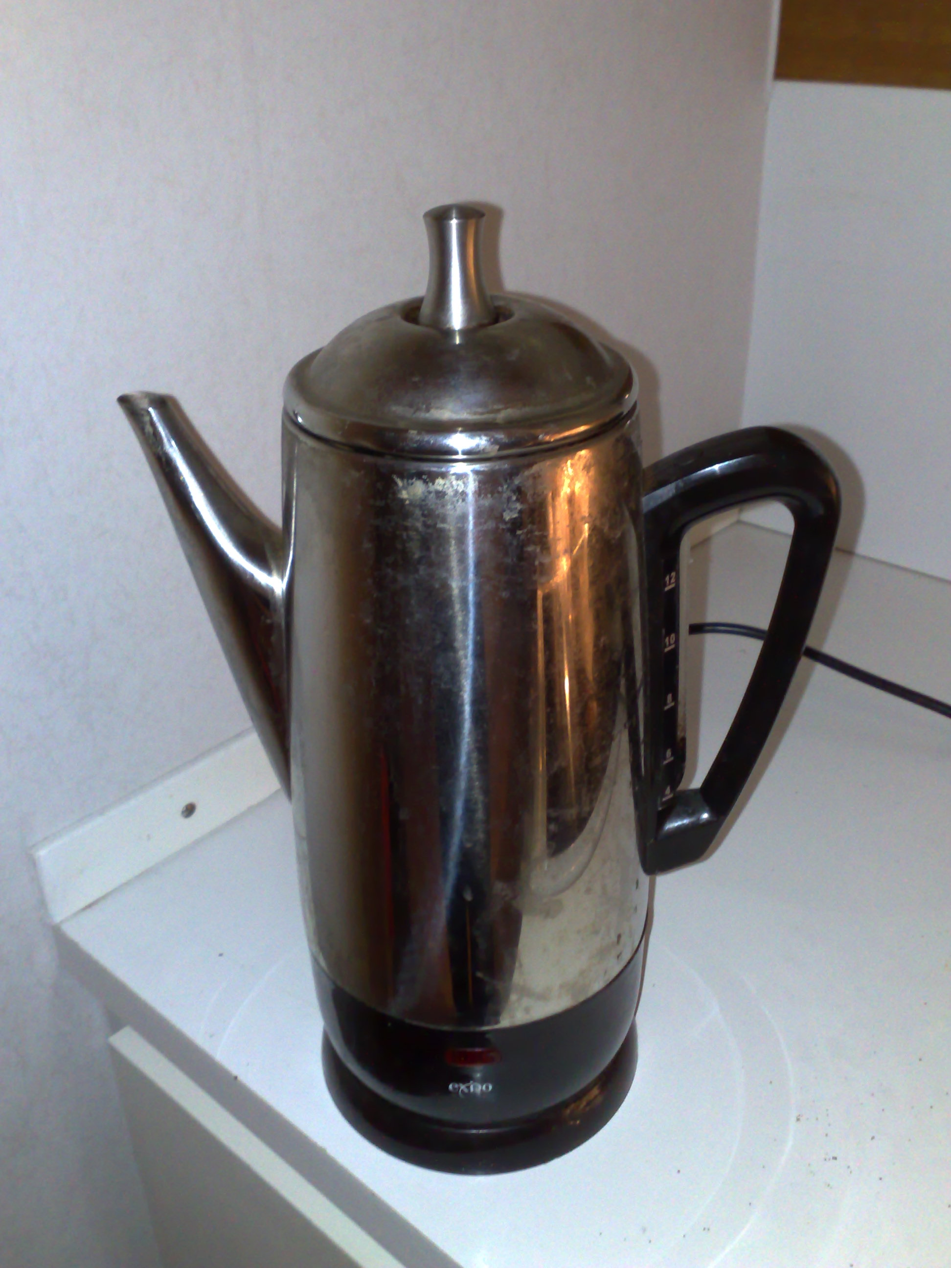 Perkulator